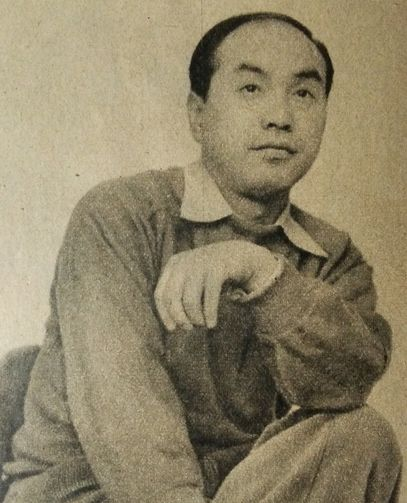 亀倉雄策